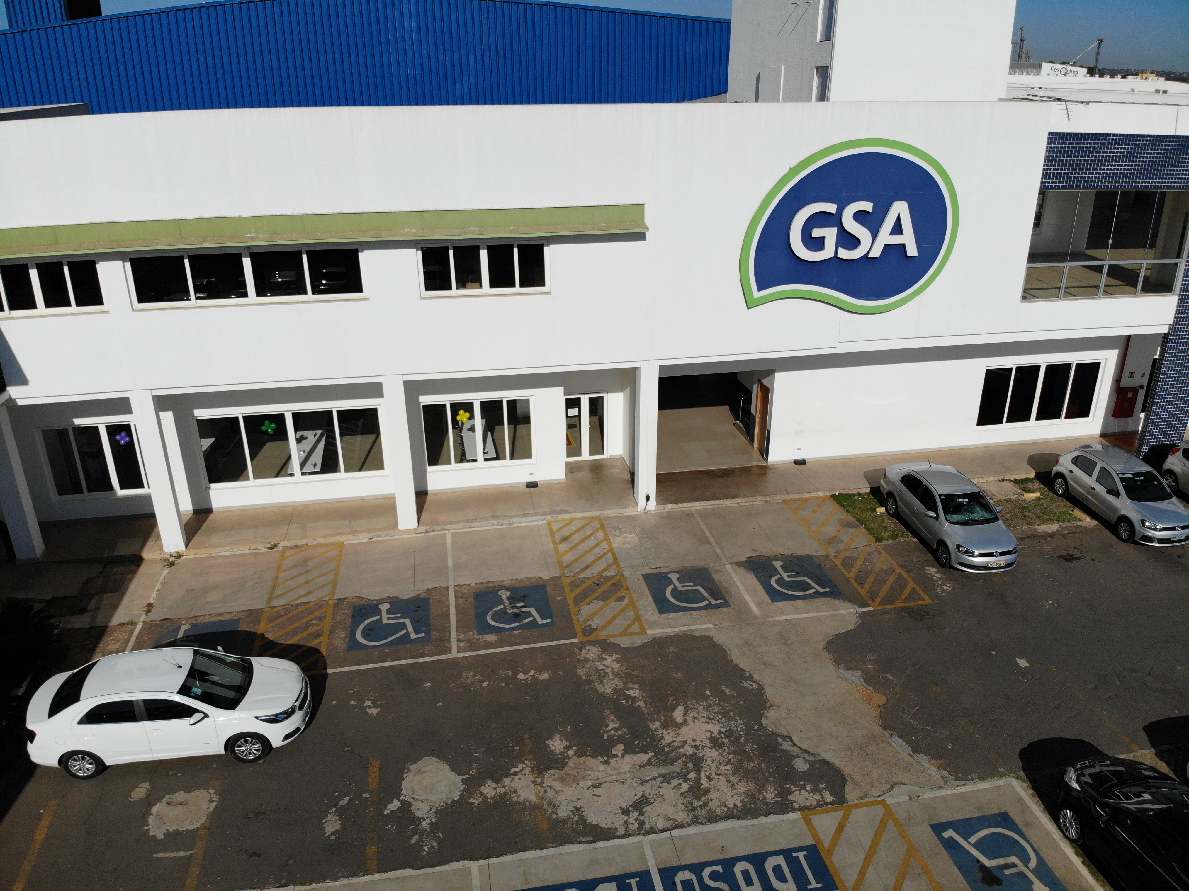 FACHADA